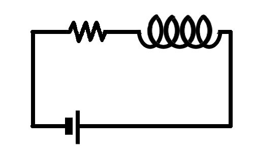 직류회로도